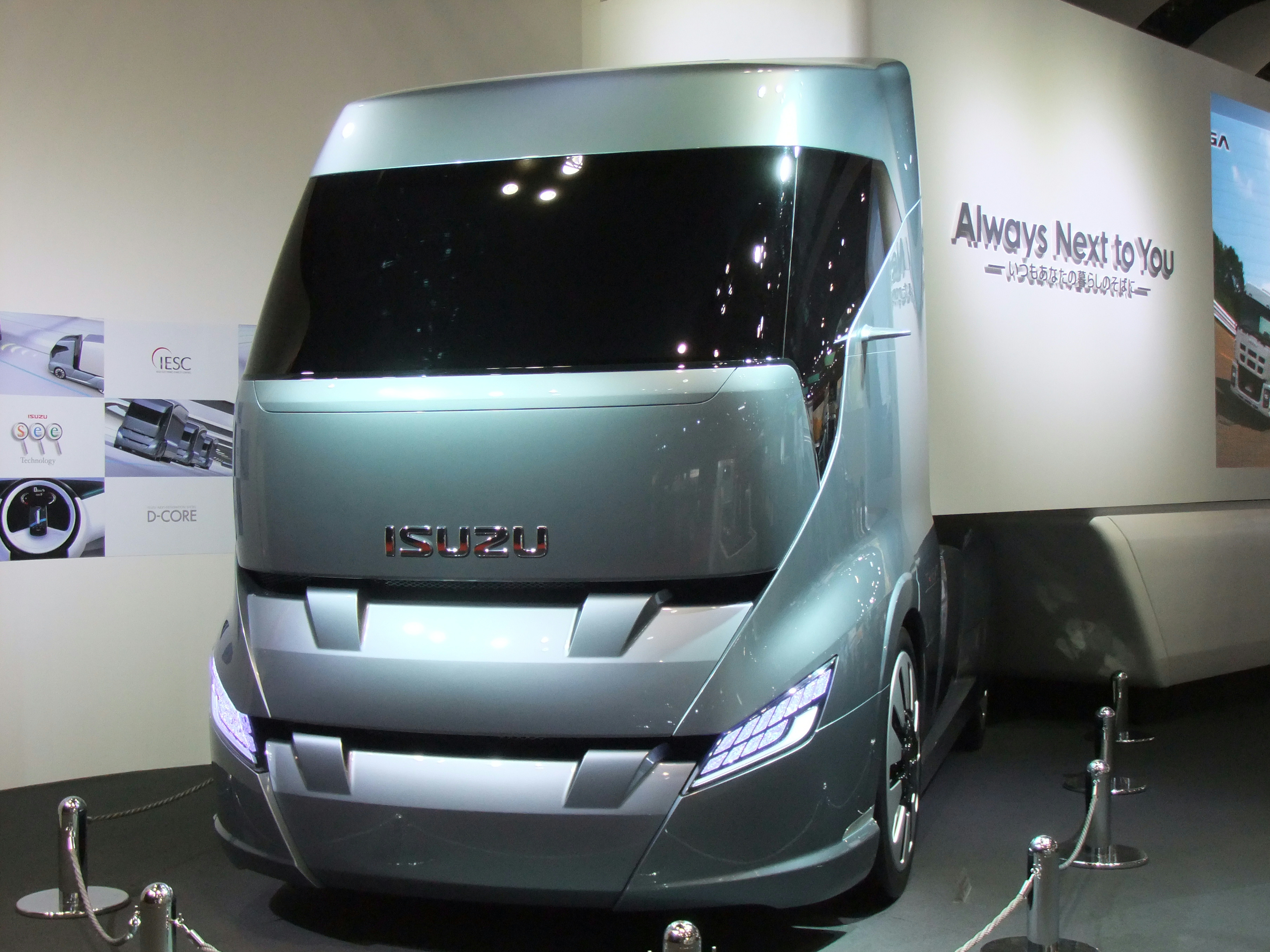 いすゞ自動車（株），東京モーターショー2011で展示した未来のトラック・デザインのスタディ・モデル